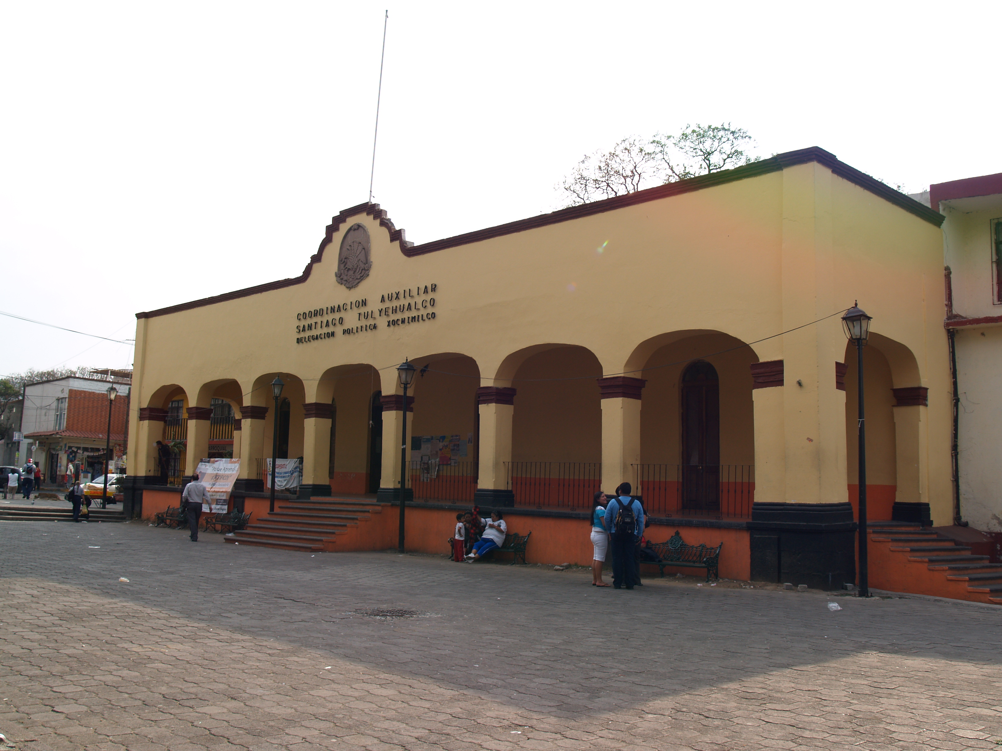 Coordinación auxiliar de Xochimilco en Tulyehualco y plaza cívica Quirino Mendoza